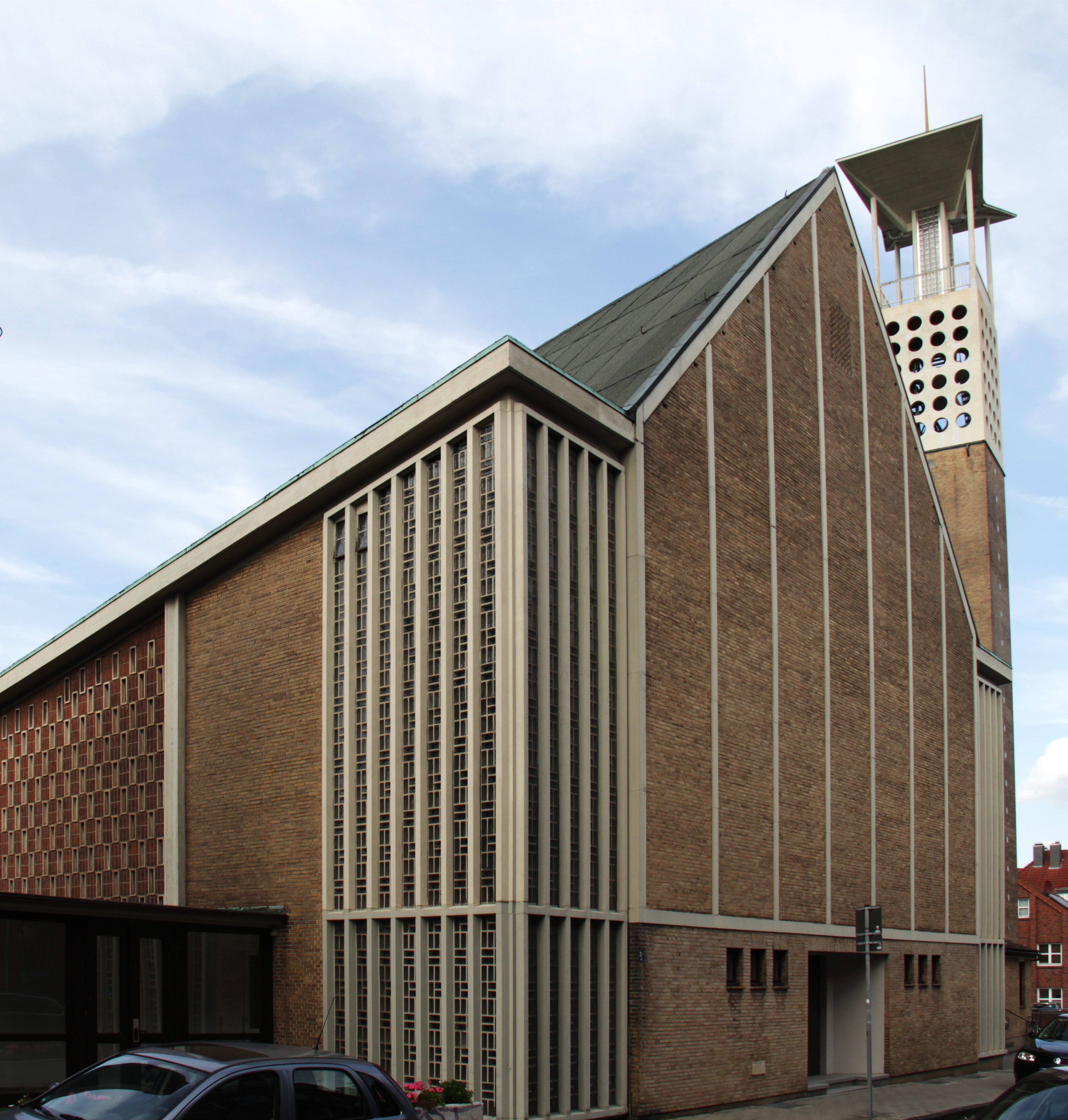 Matthäuskirche in Münster / Westfalen, Stadtteil Geist